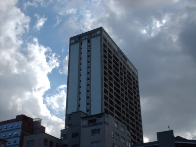 Sede del Banco Industrial de Venezuela en Caracas.